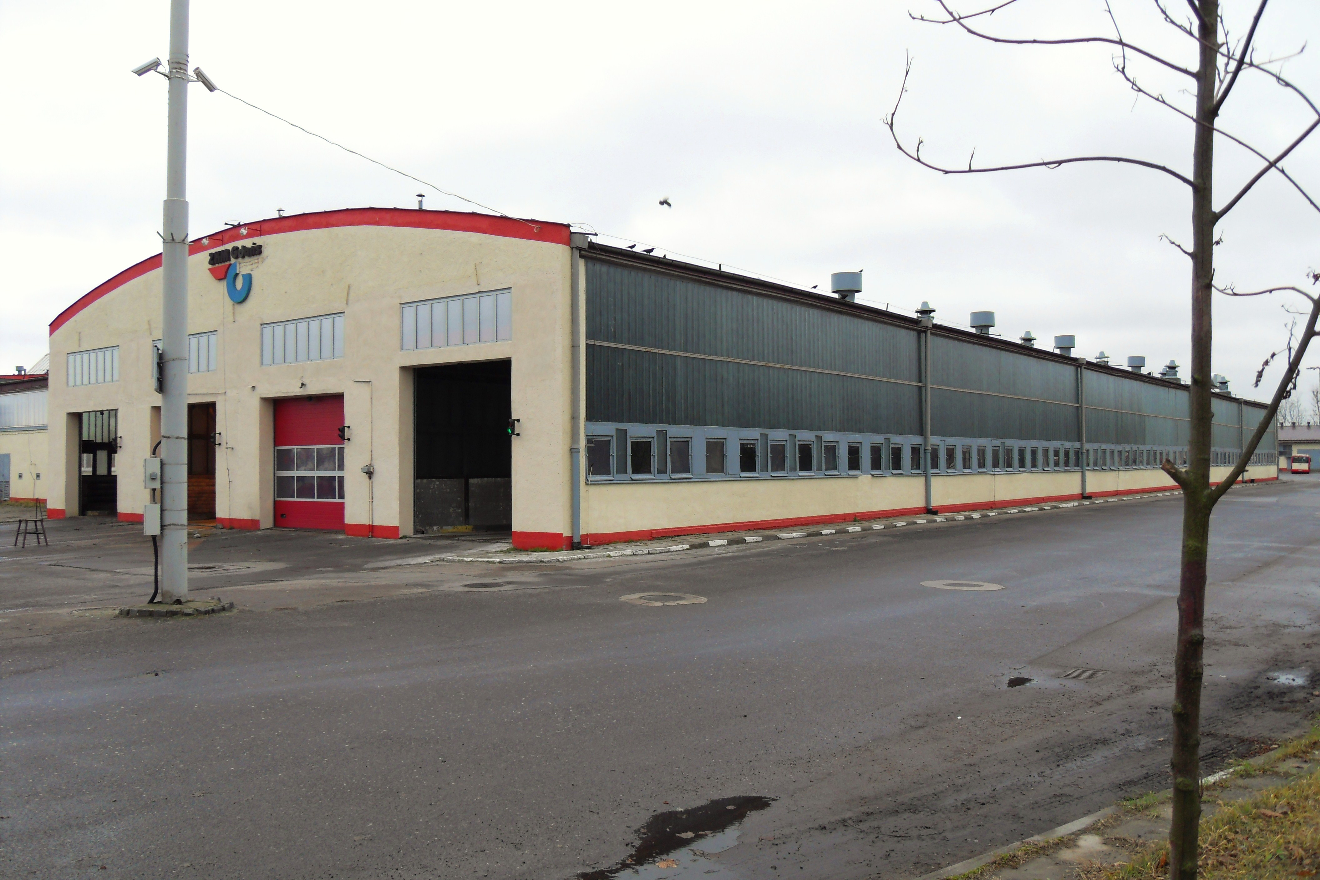 Gdańsk Wrzeszcz. Zajezdnia autobusowa przy ul. Hallera.